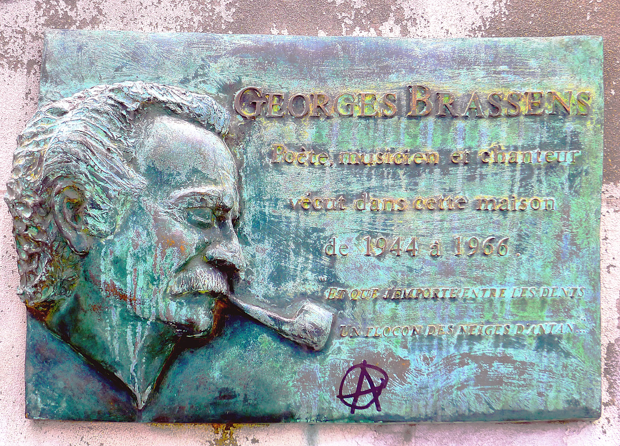 Impasse Florimont (plaque commémorative de Georges Brassens qui y habita de 1944 à 1966) - Paris XIV